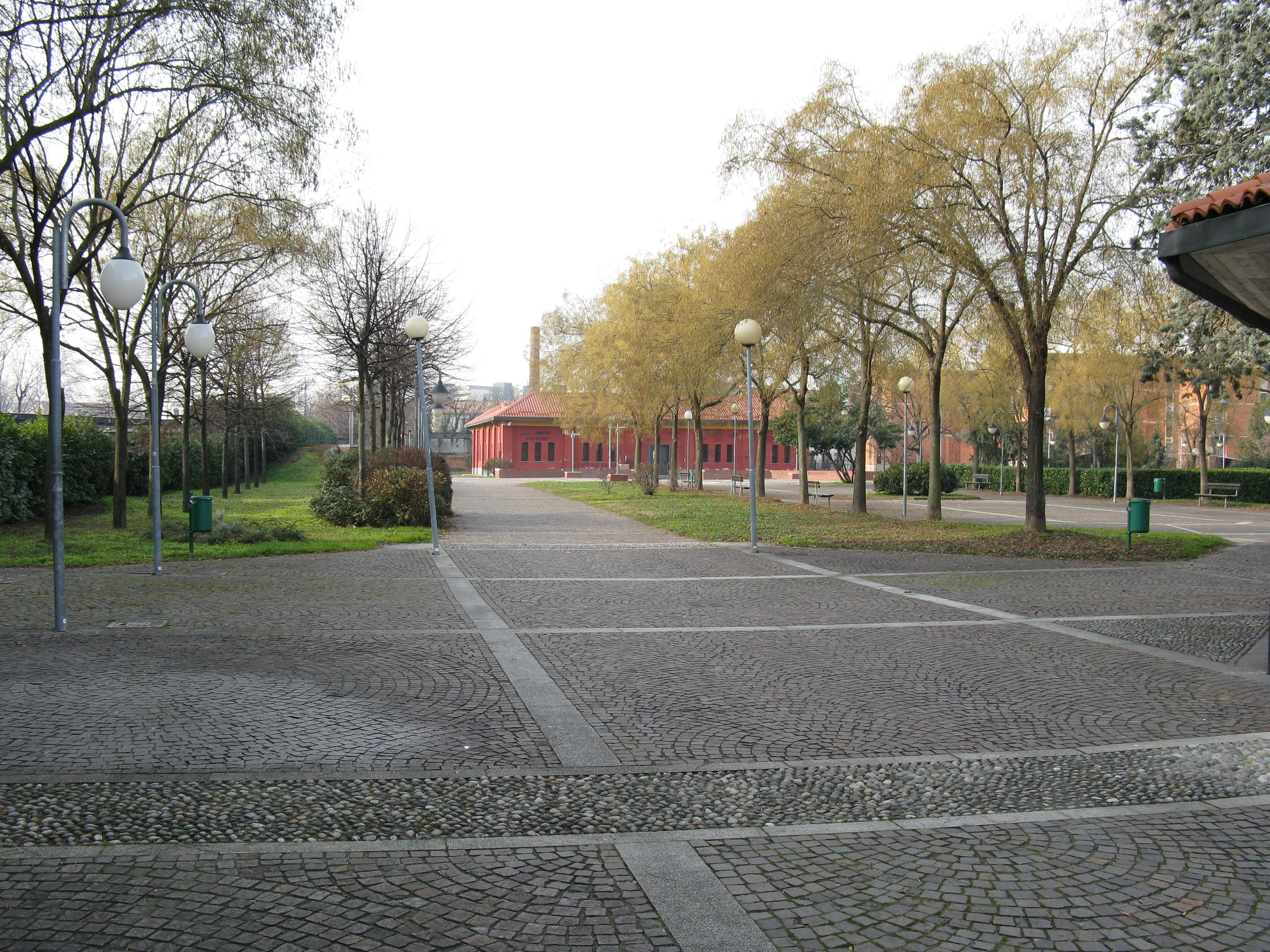 Piazza Falcone a Baranzate